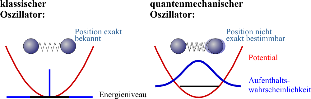 zur Nullpunktsenergie des QM-harmonischen Oszillators